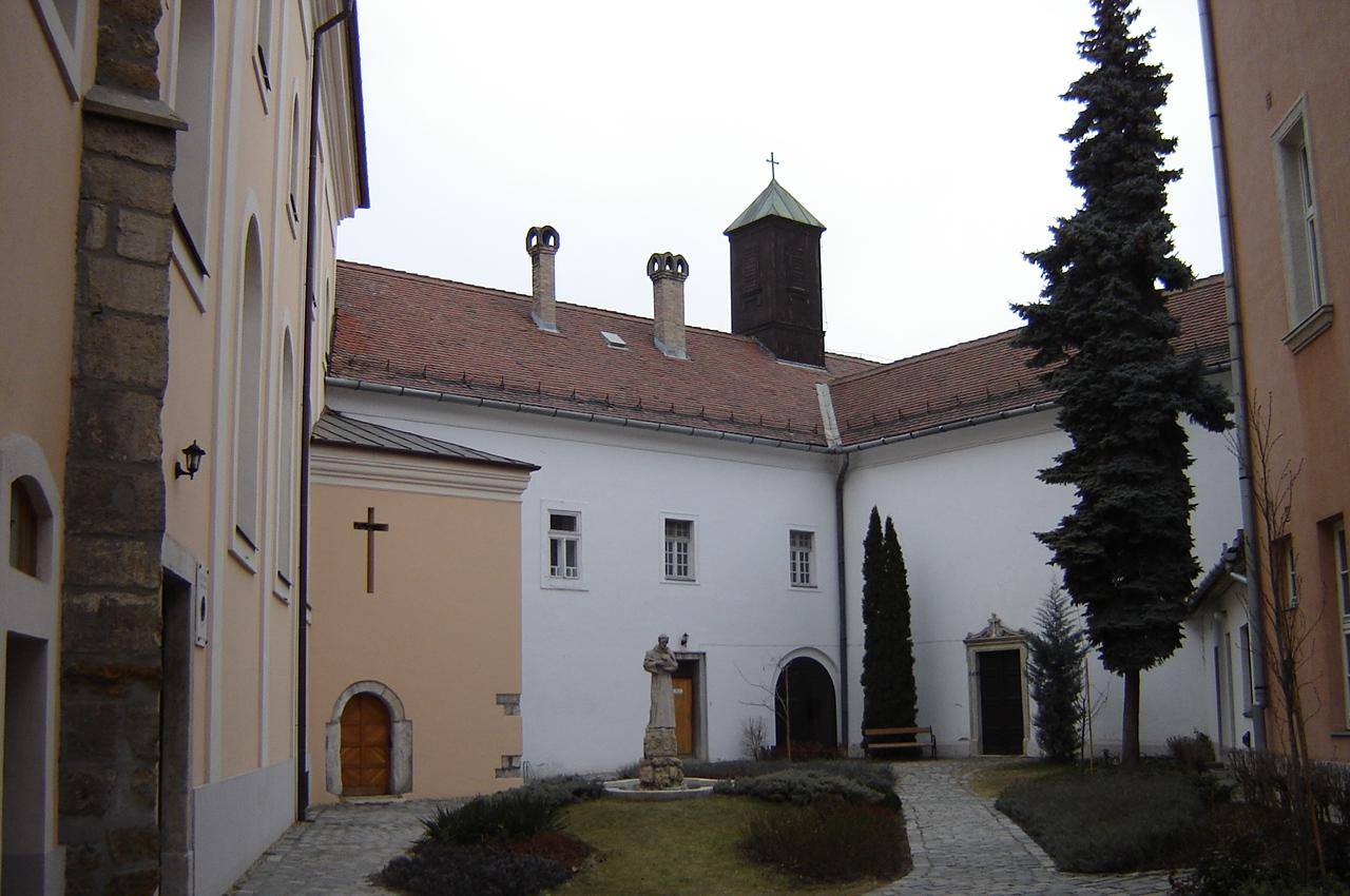 A kecskeméti Szent Miklós-templom udvara